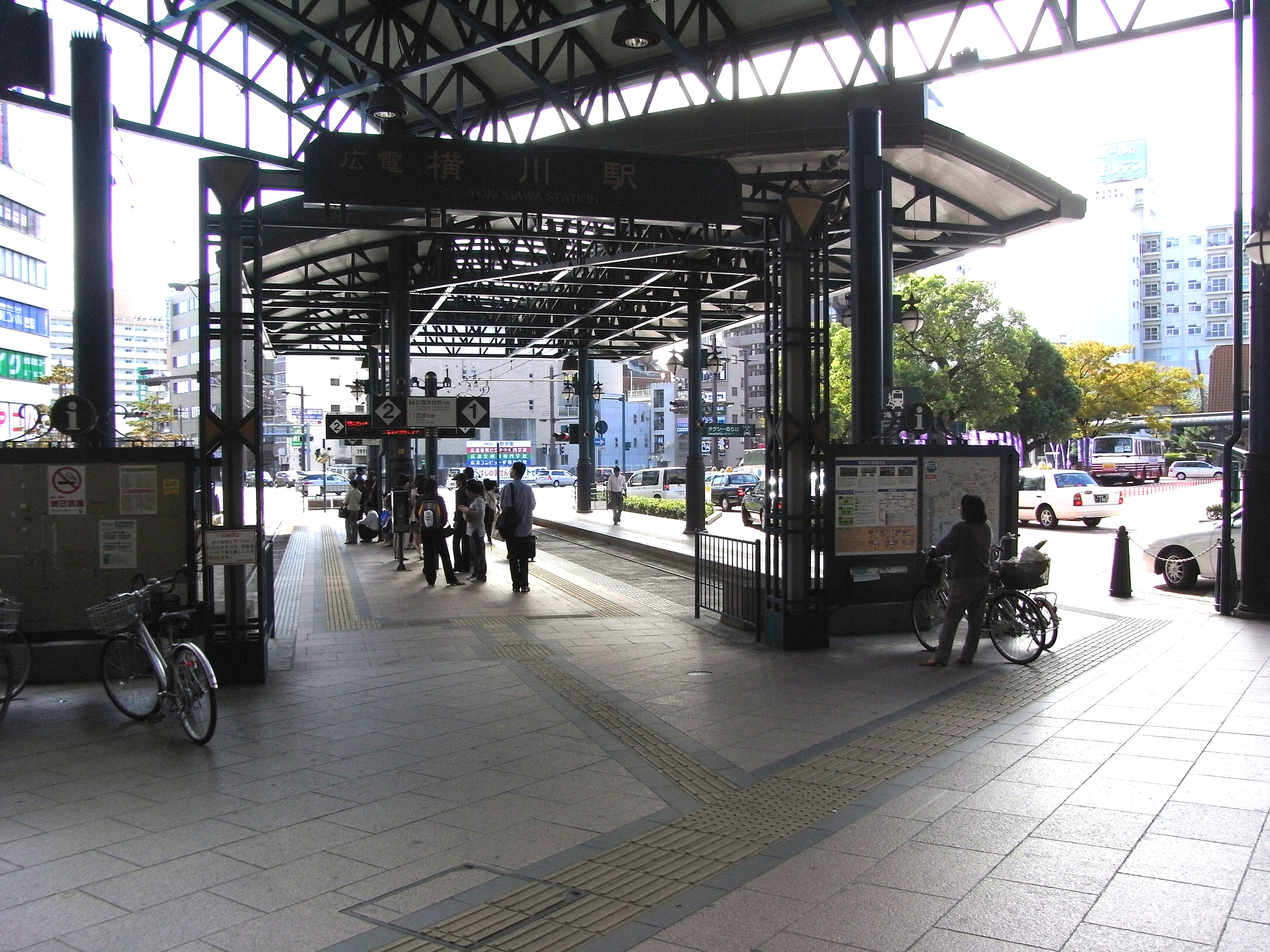 広電横川駅